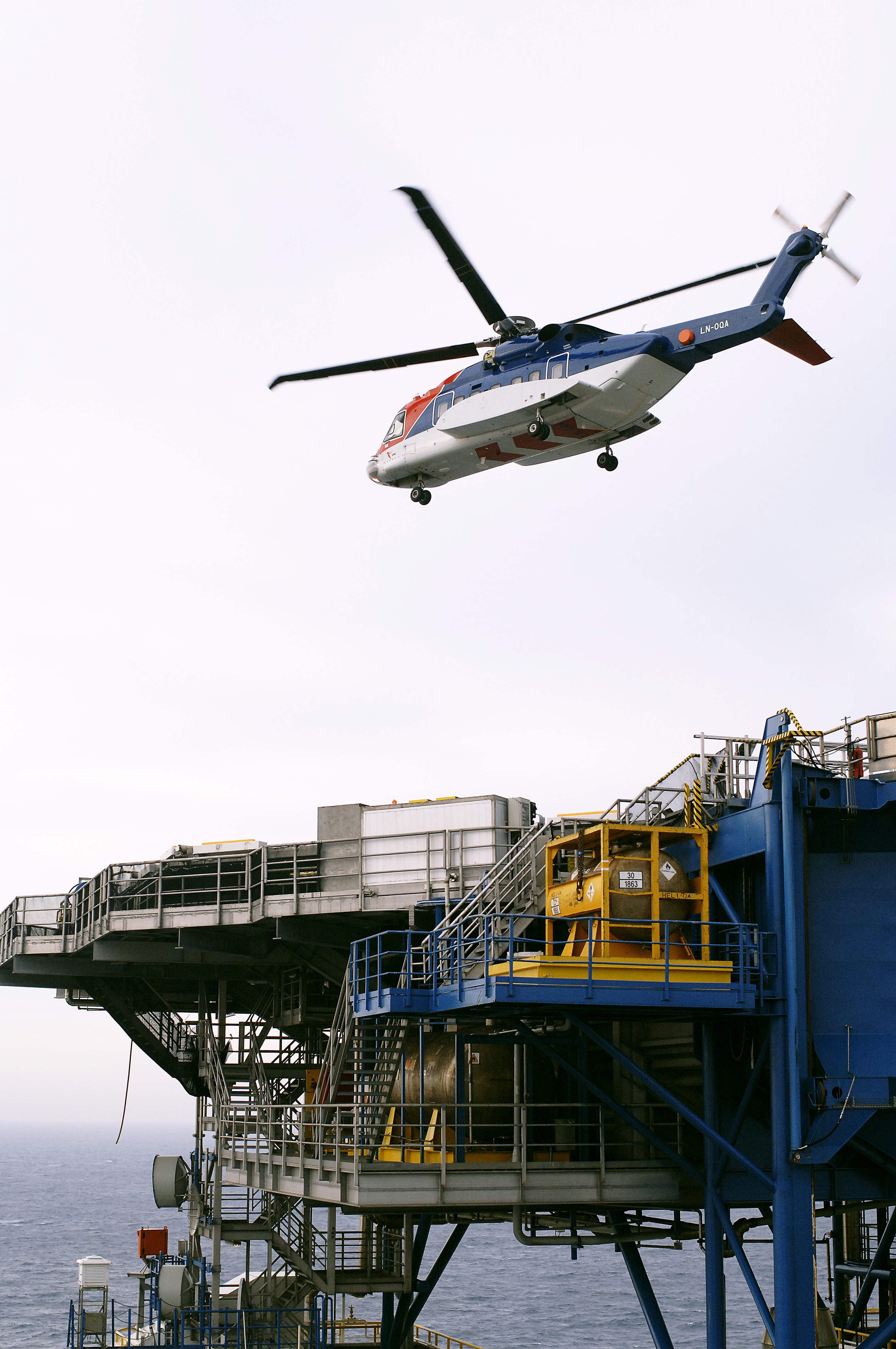 Foto: Norsk olje og gass/Tom Haga Oseberg feltsenter